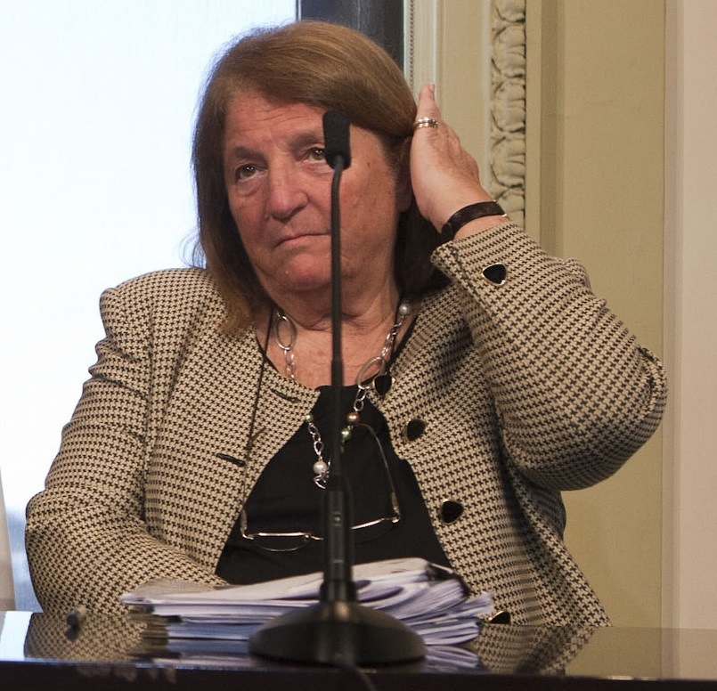 Susana Ruiz Ceruti, que fuera Canciller de la Argentina durante la presidencia de Raúl Alfonsín.